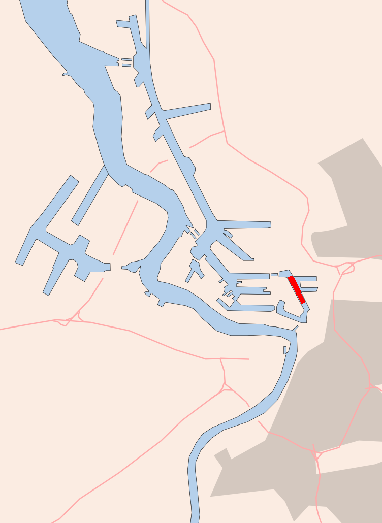 Antwerp , Albertdok